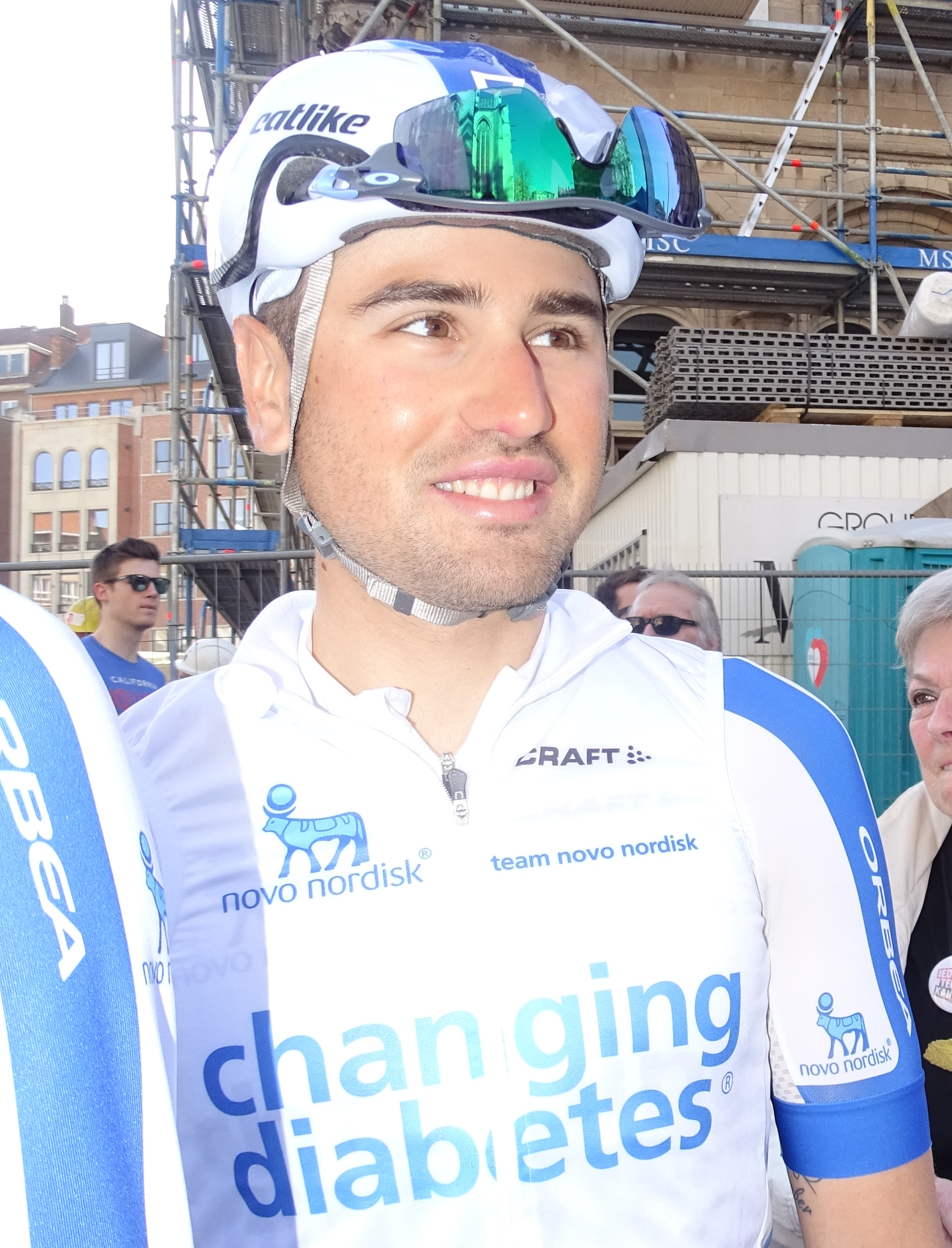 Reportage réalisé le mercredi 15 avril à l'occasion du départ de la Flèche brabançonne 2015 à Louvain, Belgique.